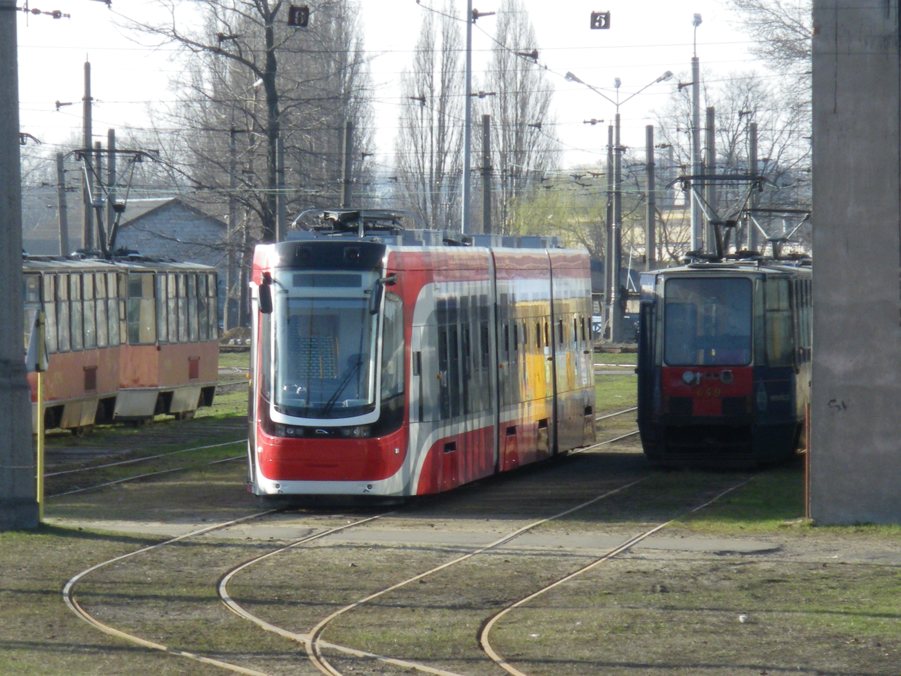 Tramwaj PESA Twist numer taborowy 621 w barwach MPK Częstochowa. Jest to pierwszy z siedmiu tramwajów skonstruowanych na zlecenie MPK Częstochowa. Nowe tramwaje obsługiwać mają nową linię nr 3 Fieldorafa Nila - Stadion Raków.